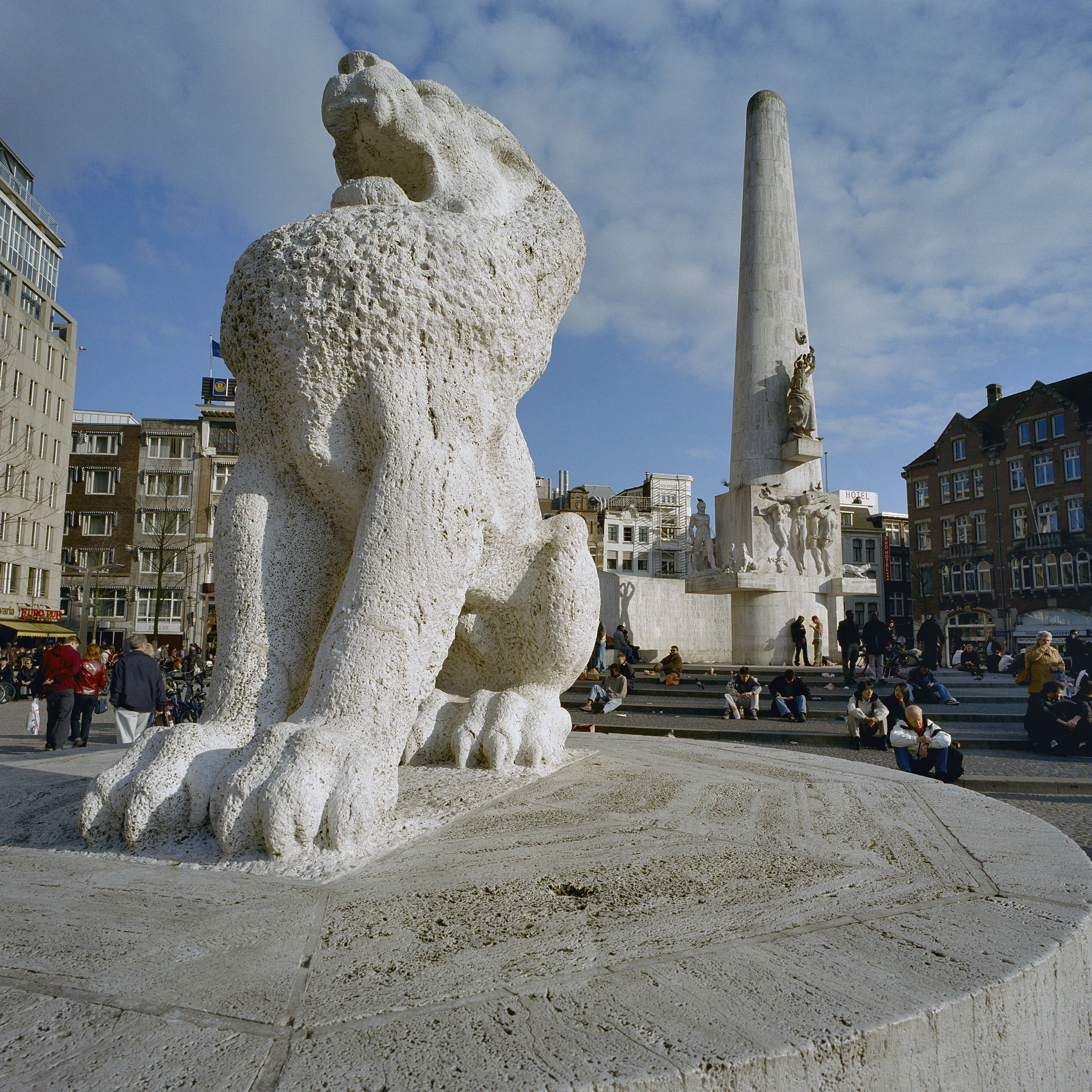 Nationaal Monument: Overzicht gedeelte achterzijde muur met tekst en gedeelte pyloon (opmerking: Gefotografeerd voor Monumenten van Herrezen Nederland, bladzijde 122)